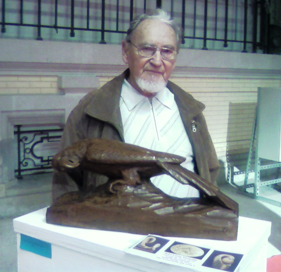 Jean-Louis Pariselle, sculpteur